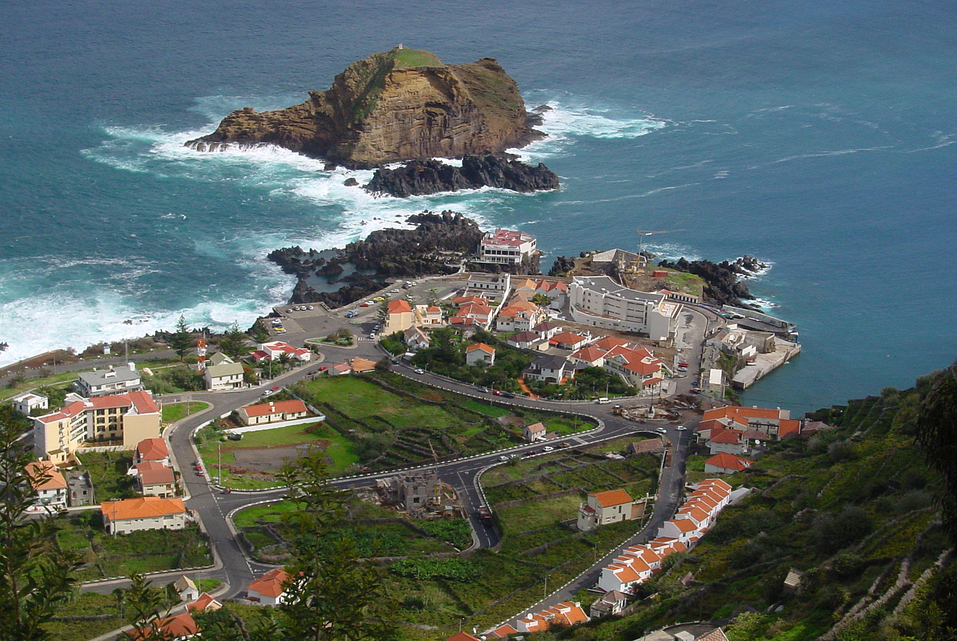 Porto Moniz, looking NE